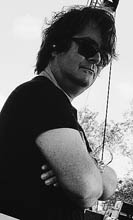 Jonathan Noyce, englischer E-Bassist 22.06.2017